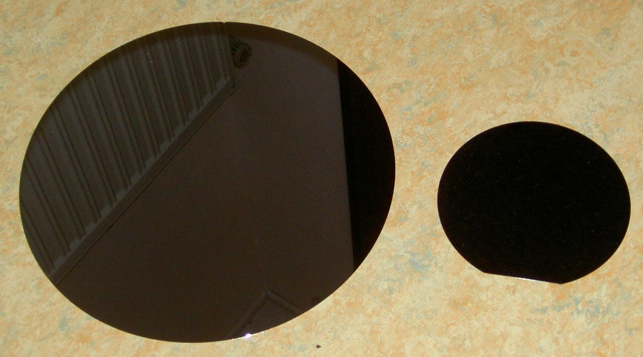 Silizium-Wafer ohne IC-Schaltkreise. 2 verschiedene Größen